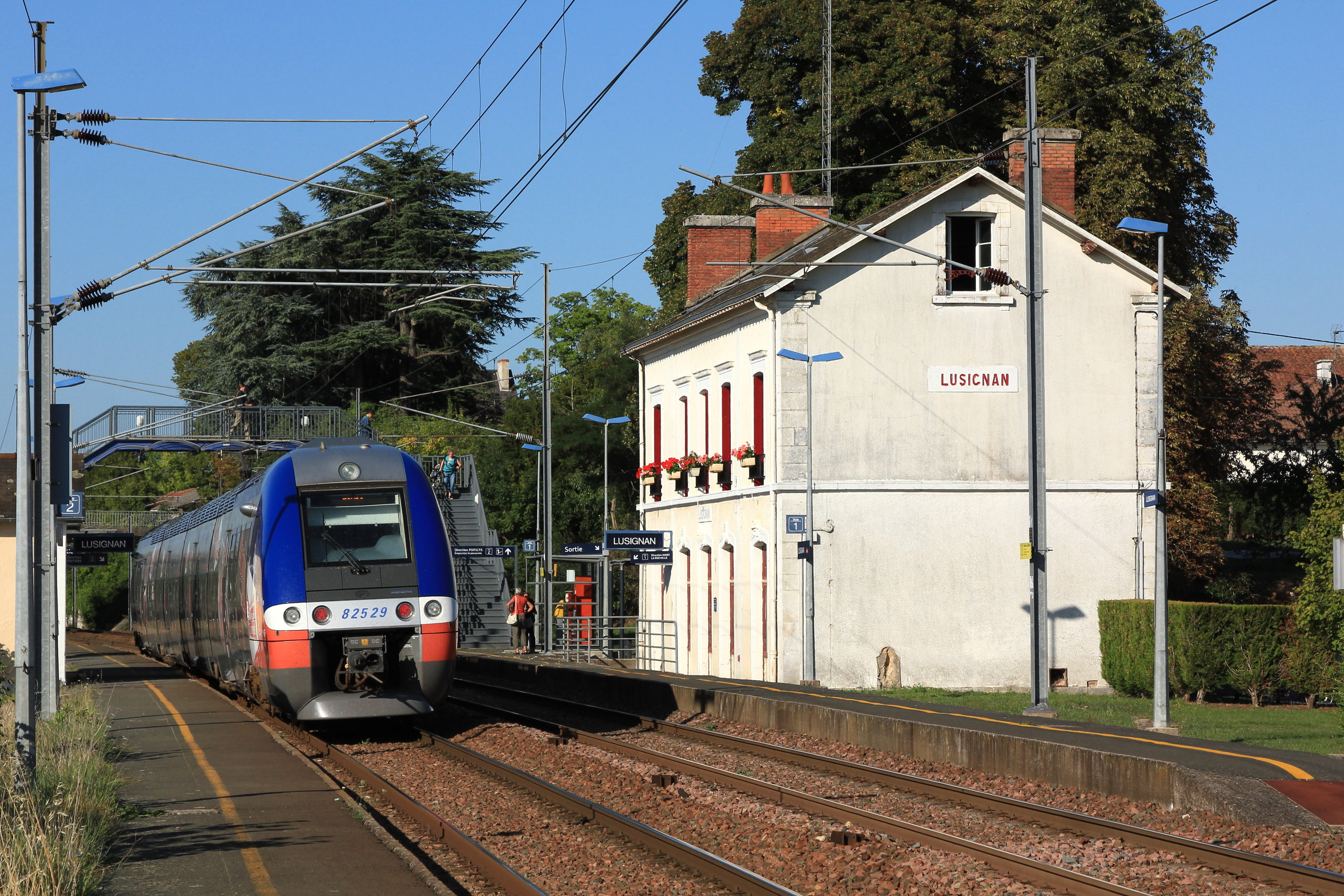 Le B 82529/30 sur un TER La Rochelle - Poitiers dessert la gare de Lusignan.